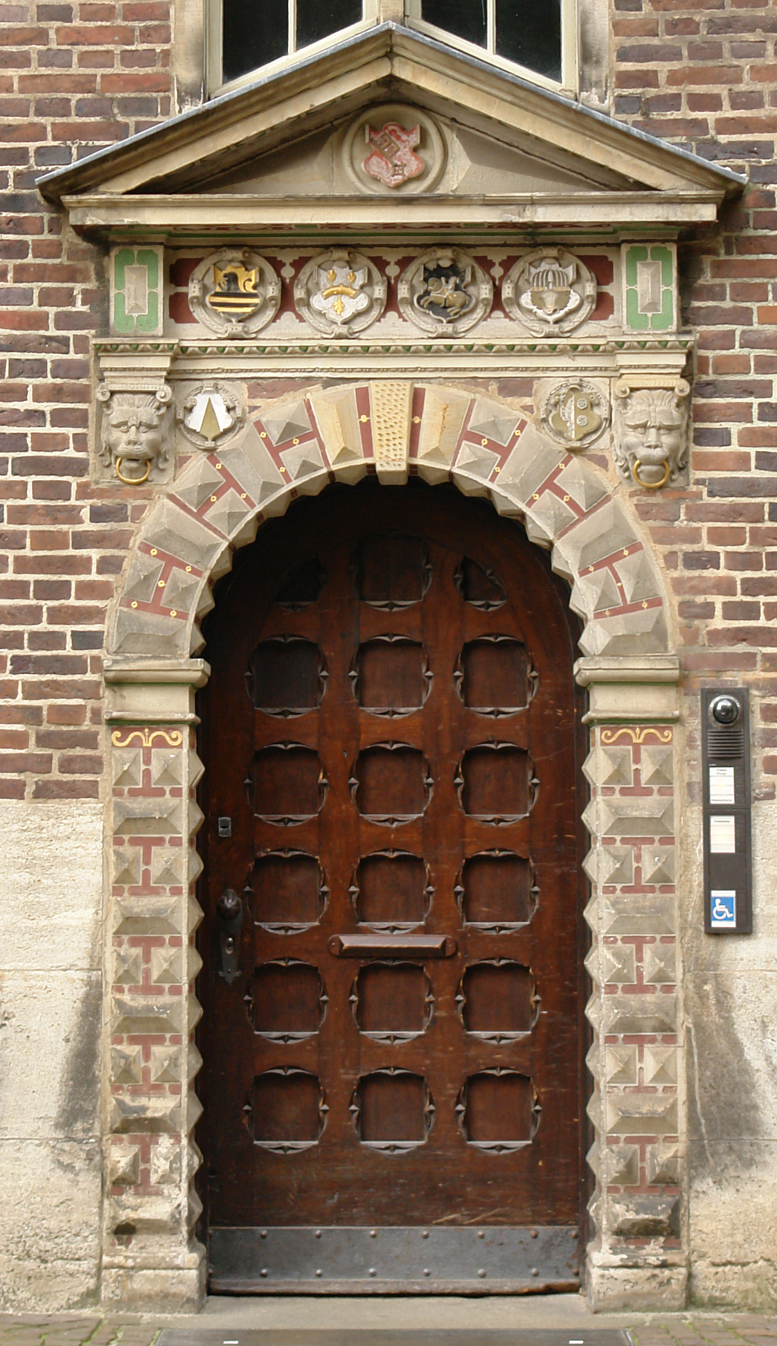 Rathaus in Bremen, Renaissanceportal aus dem Kanzleianbau des Alten Rathauses an der Nordwestwand des Neuen Rathauses, links neben dem TreppenturmDas abgebildete Objekt ist ein geschütztes Kulturdenkmal in der Freien Hansestadt Bremen, mit der Nr. 0066,T001 beim Landesamt für Denkmalpflege registriert.